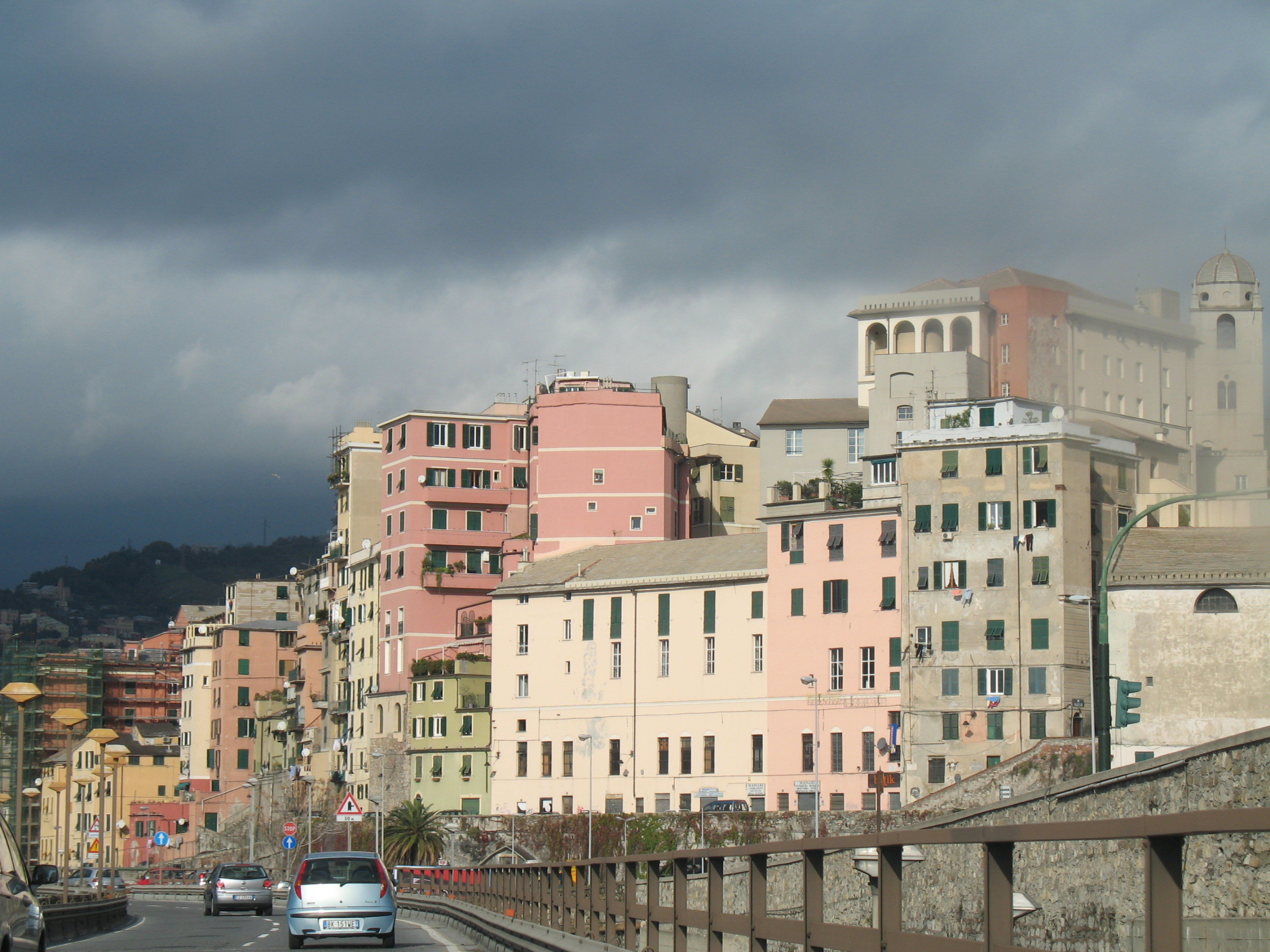 Immagine da Genova La collina di Castello vista dalla sopraelevata. In alto a destra il complesso della chiesa e del chiostro di Santa Maria di Castello.